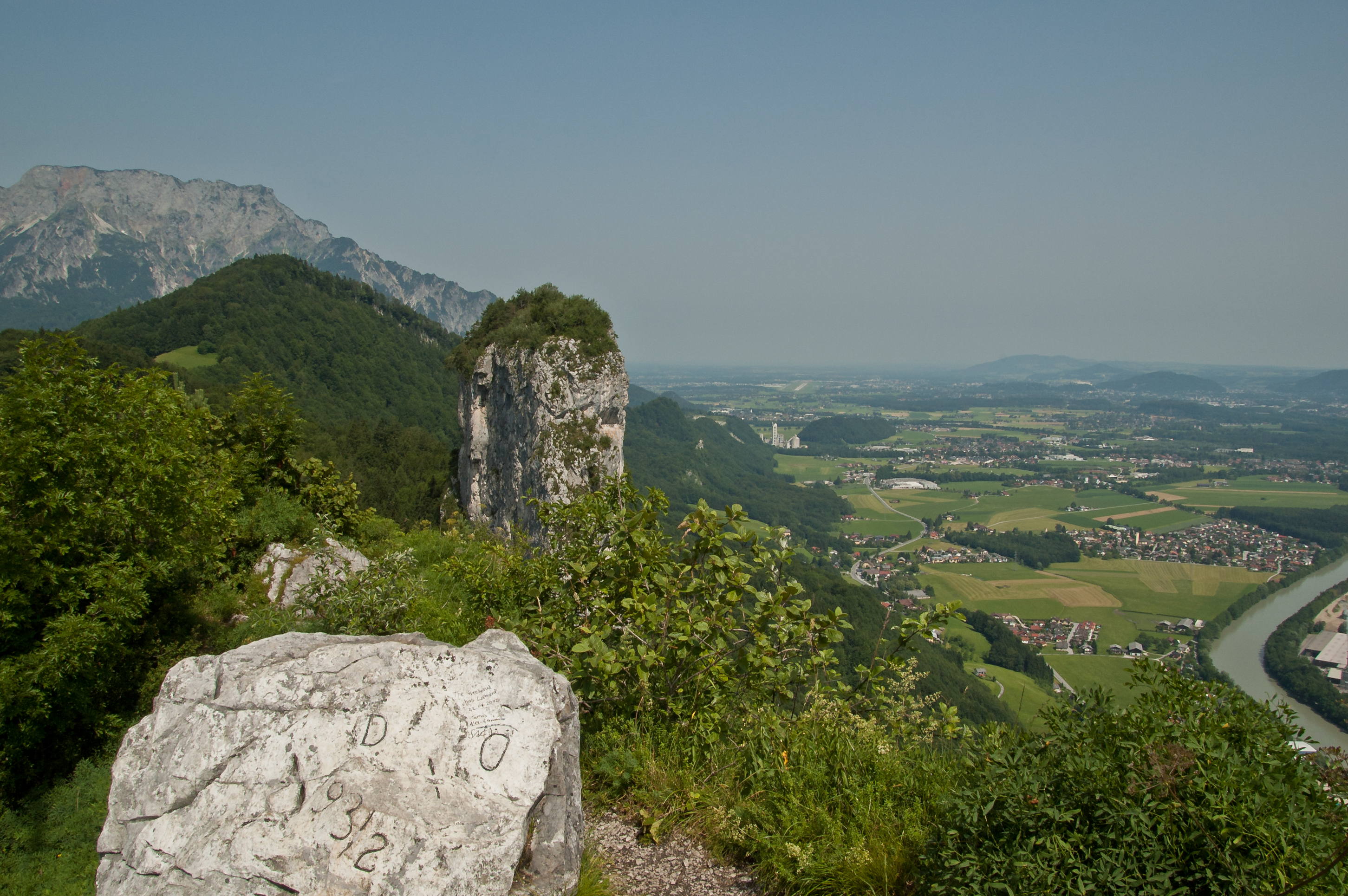 Das Grenzzeichen 93/2 zwischen Deutschland und Österreich auf dem kleinen Barmstein. Links das Berchtesgadener Land, rechts Blick ins Salzburger Land. Im Hintergrund das Untersbergmassiv